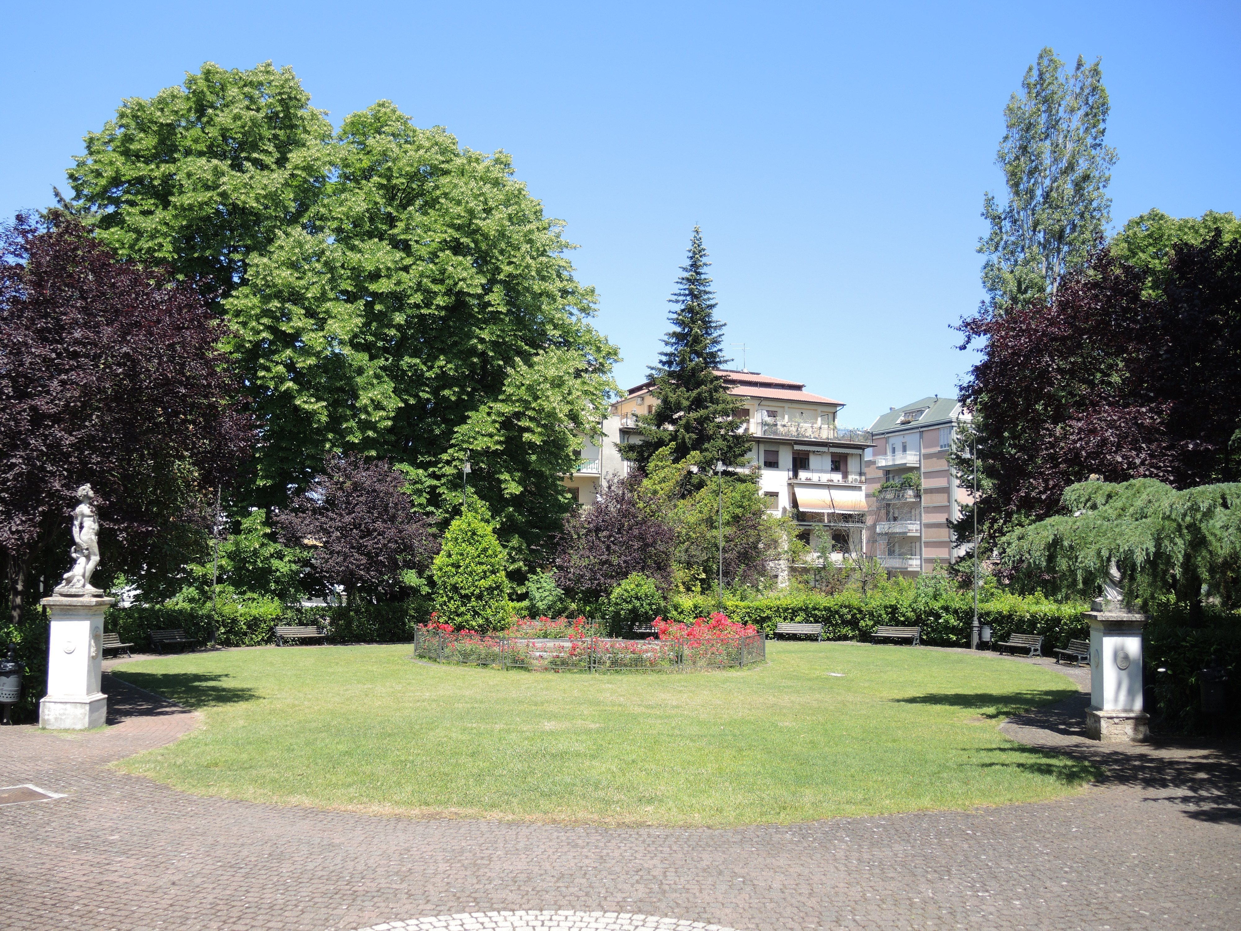 Lanciano - Parco di Villa delle Rose